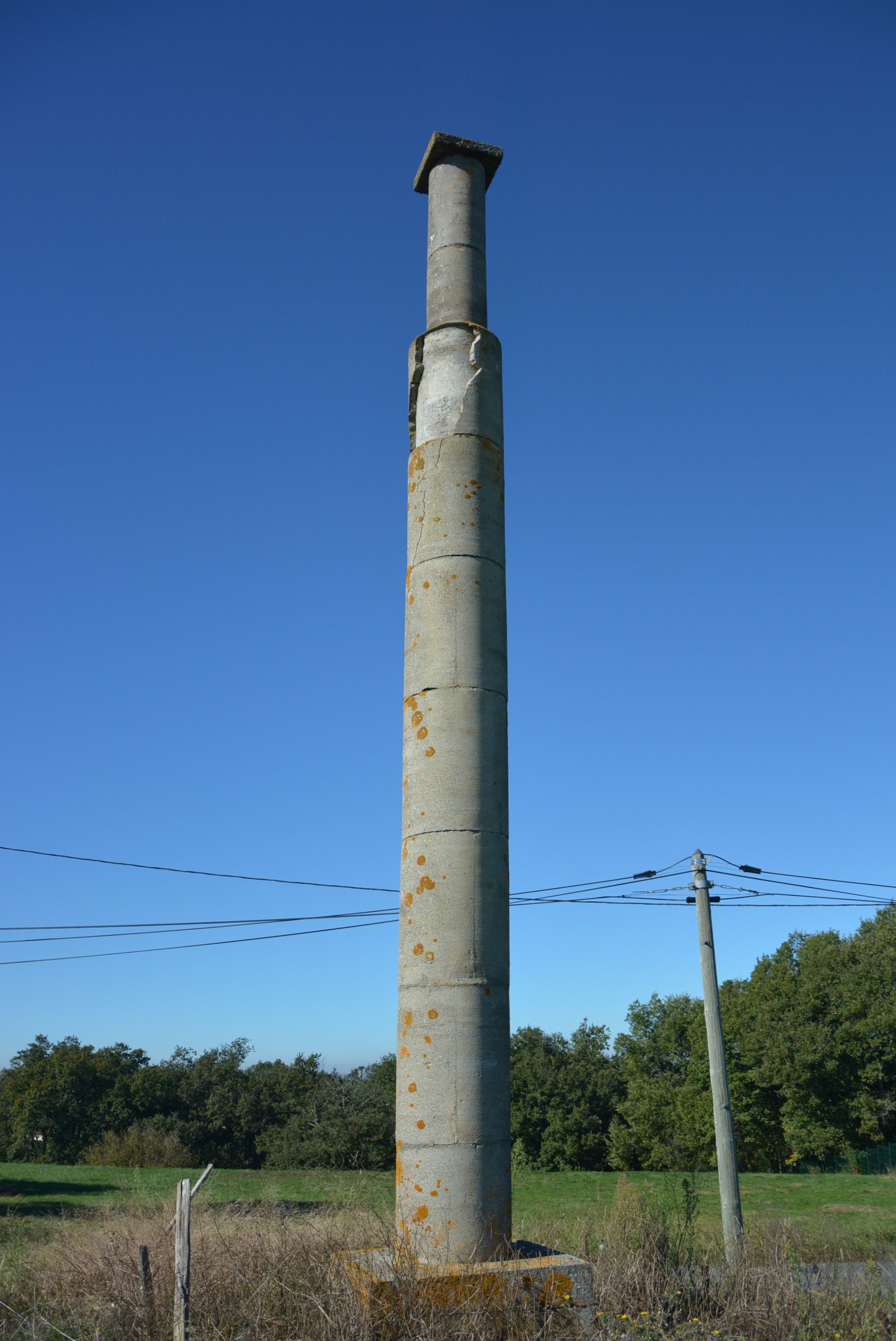 Cheminée (ou tour) géodésique de Plagnole, dont la fiche descriptive est disponible sur le serveur de fiches géodésiques de l'IGN, sous la référence 3142301.